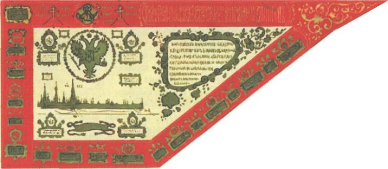 Гербовое знамя царя Алексея Михайловича (1668 г.)